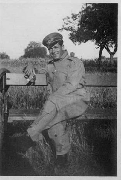 Димитър Бъчваров